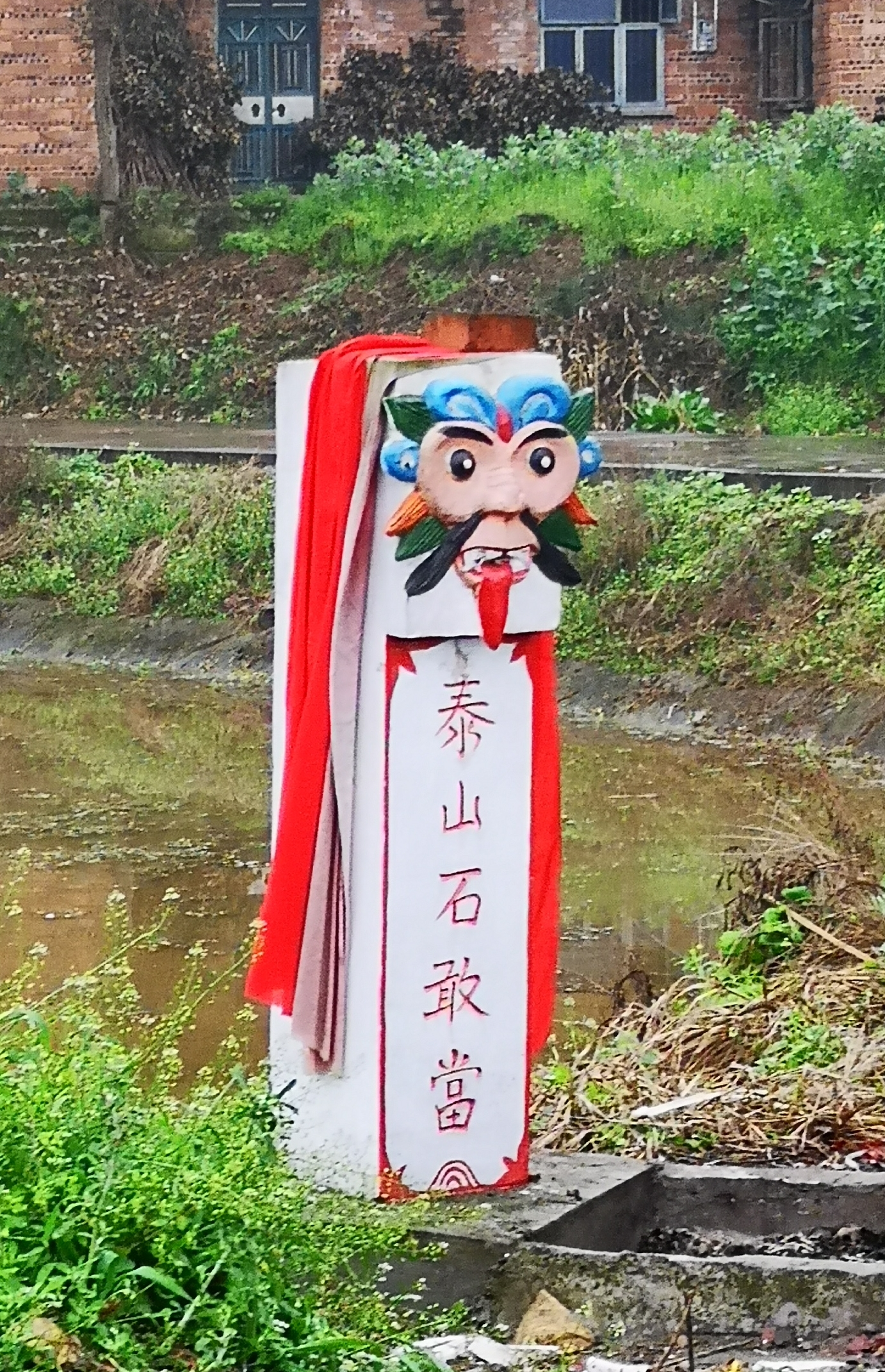 四川瀘縣農村一處岔路口旁的泰山石敢當（當地稱呼爲“吞口”，但“吞口”一名其實另有所指）